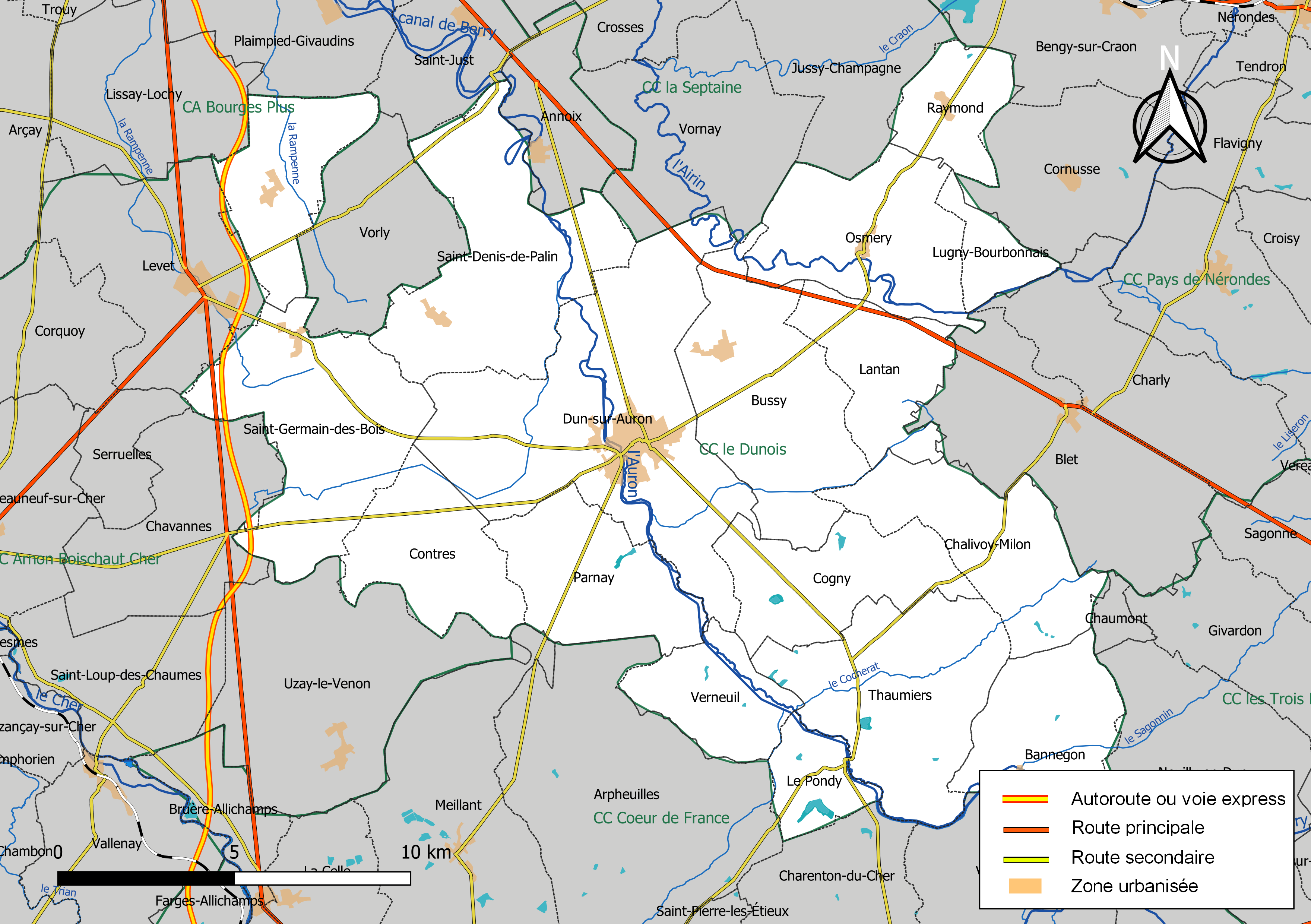 Carte géographique de la communauté de communes Le Dunois, département du Cher, France. Composition au 1er janvier 2019.